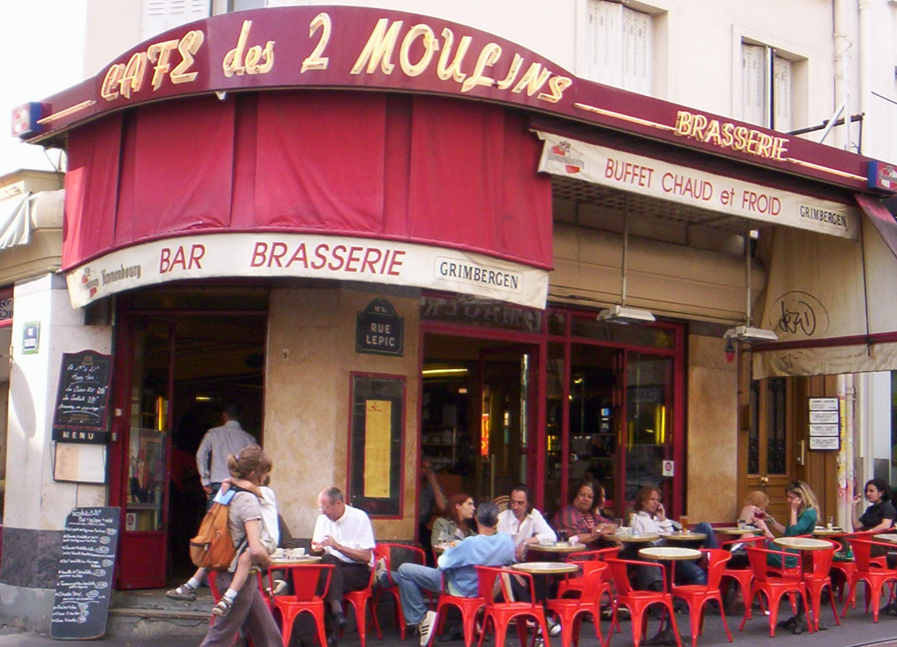 Café les Deux Moulins